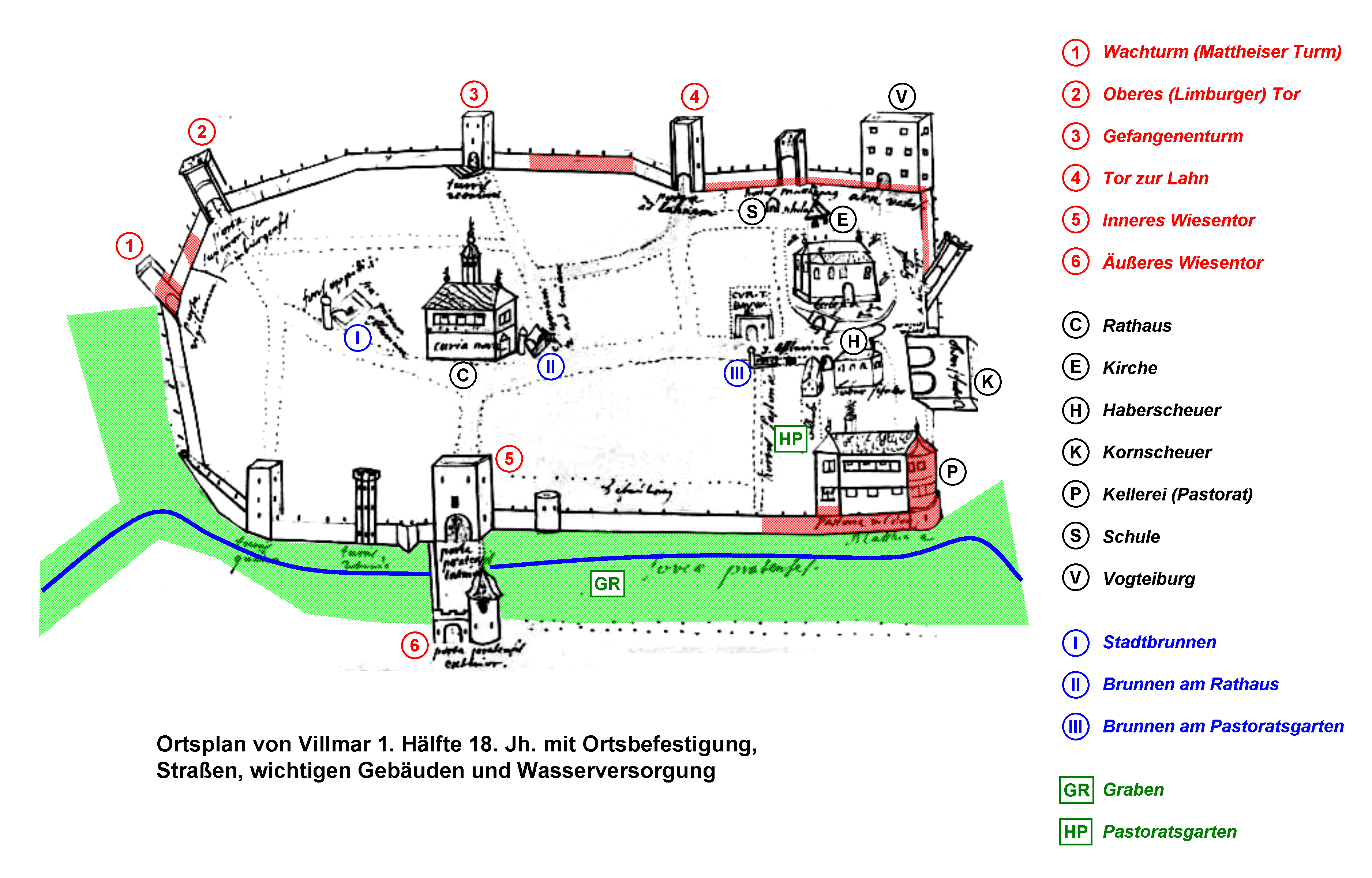 Villmar mit Befestigungsanlage und wichtigen Gebäuden in der ersten Hälfte des 18. Jh. Bearbeitung auf der Grundlage einer im Hessischen Hauptstaatsarchiv aufbewahrten Tuschezeichung. Die erhaltenen Teile der Ringmauer und Türme sind rot unterlegt. Bearbeiter: Bernold Feuerstein